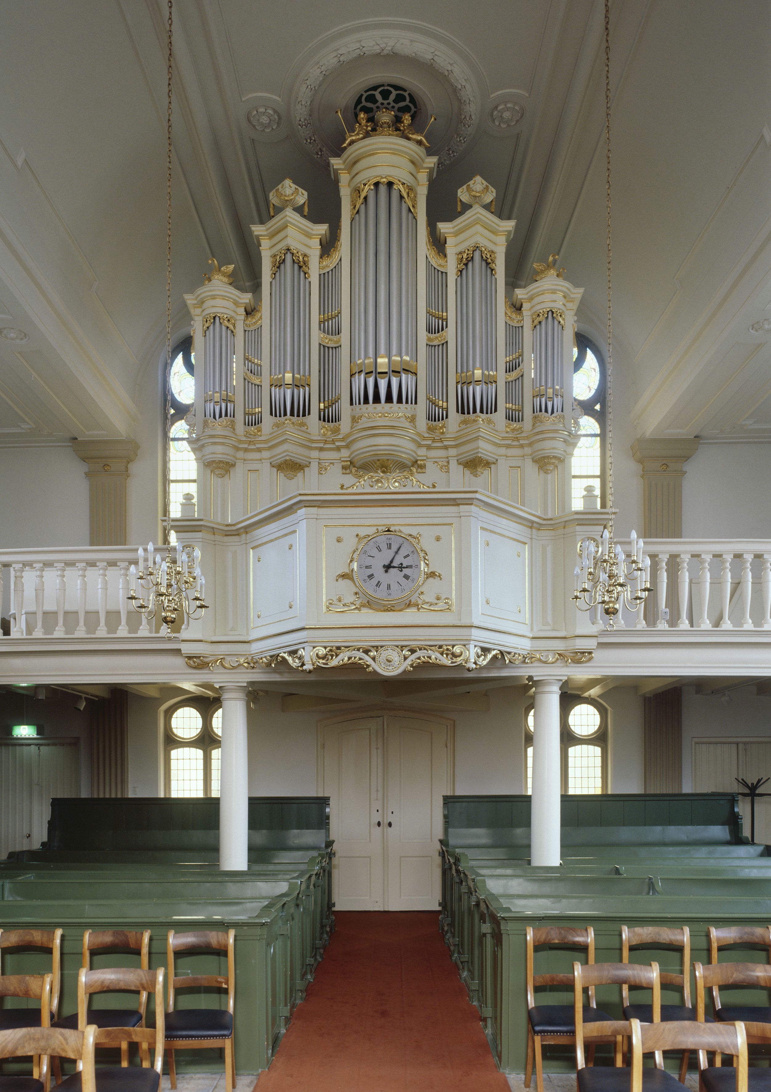 Evangelisch Lutherse Kerk: Interieur, aanzicht orgel, orgelnummer 1866 (opmerking: Gefotografeerd voor Het Historische Orgel in Nederland 1878-1886, Bladzijde 216)